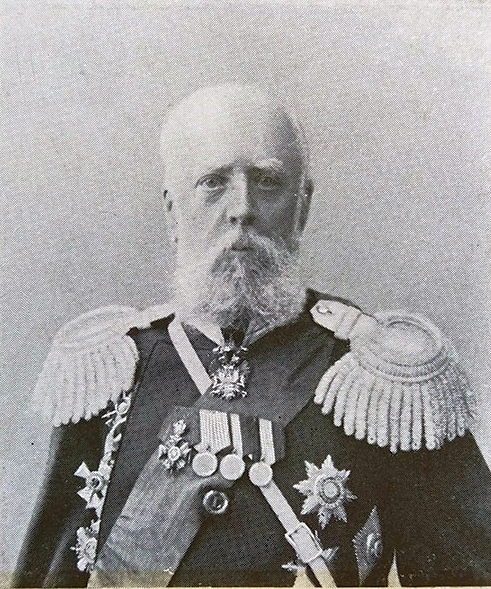 Аллер, Александр Самойлович: Чин/звание: «Генерал от инфантерии»